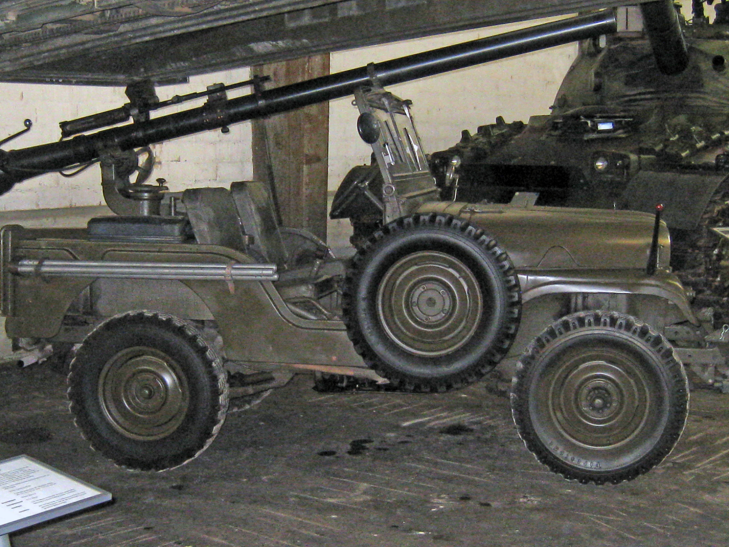 rückstossfreie Panzerabwehrkanone 58 im Militärmuseum Full